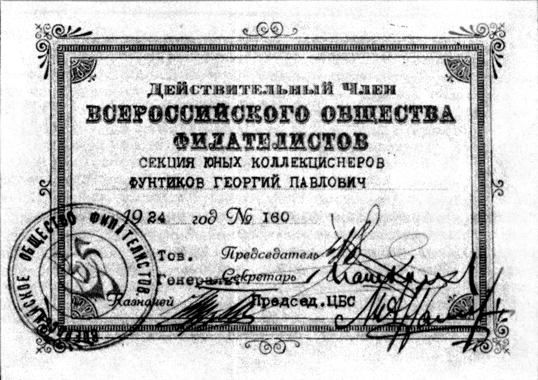 Билет члена секции юных коллекционеров Всероссийского общества филателистов